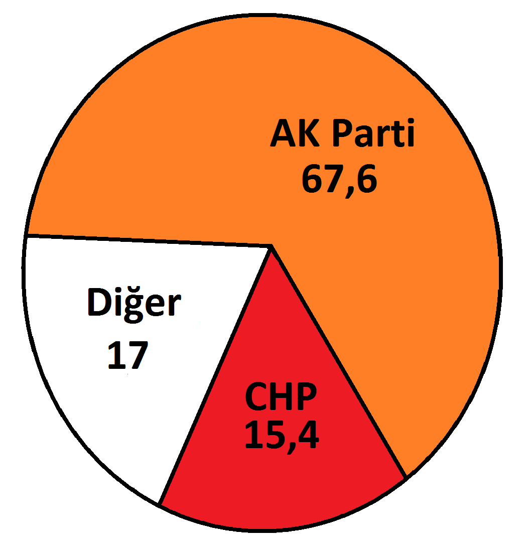 Malatya'da Kasım 2015 Türkiye genel seçimleri.